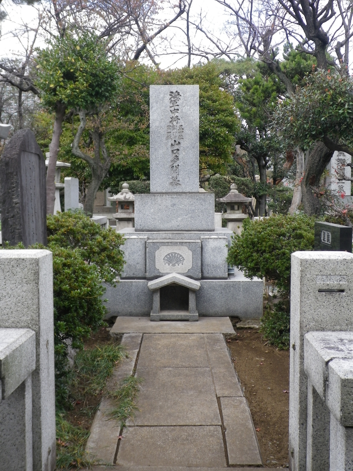 山口多聞の墓